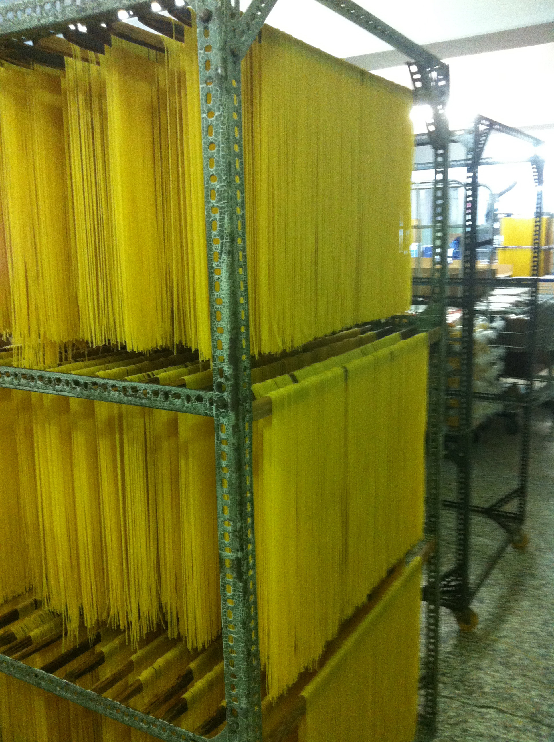 Spaghetti werden in der Finkensteiner Nudelfabrik getrocknet, bevor sie auf die Verpackungslänge geschnitten werden.